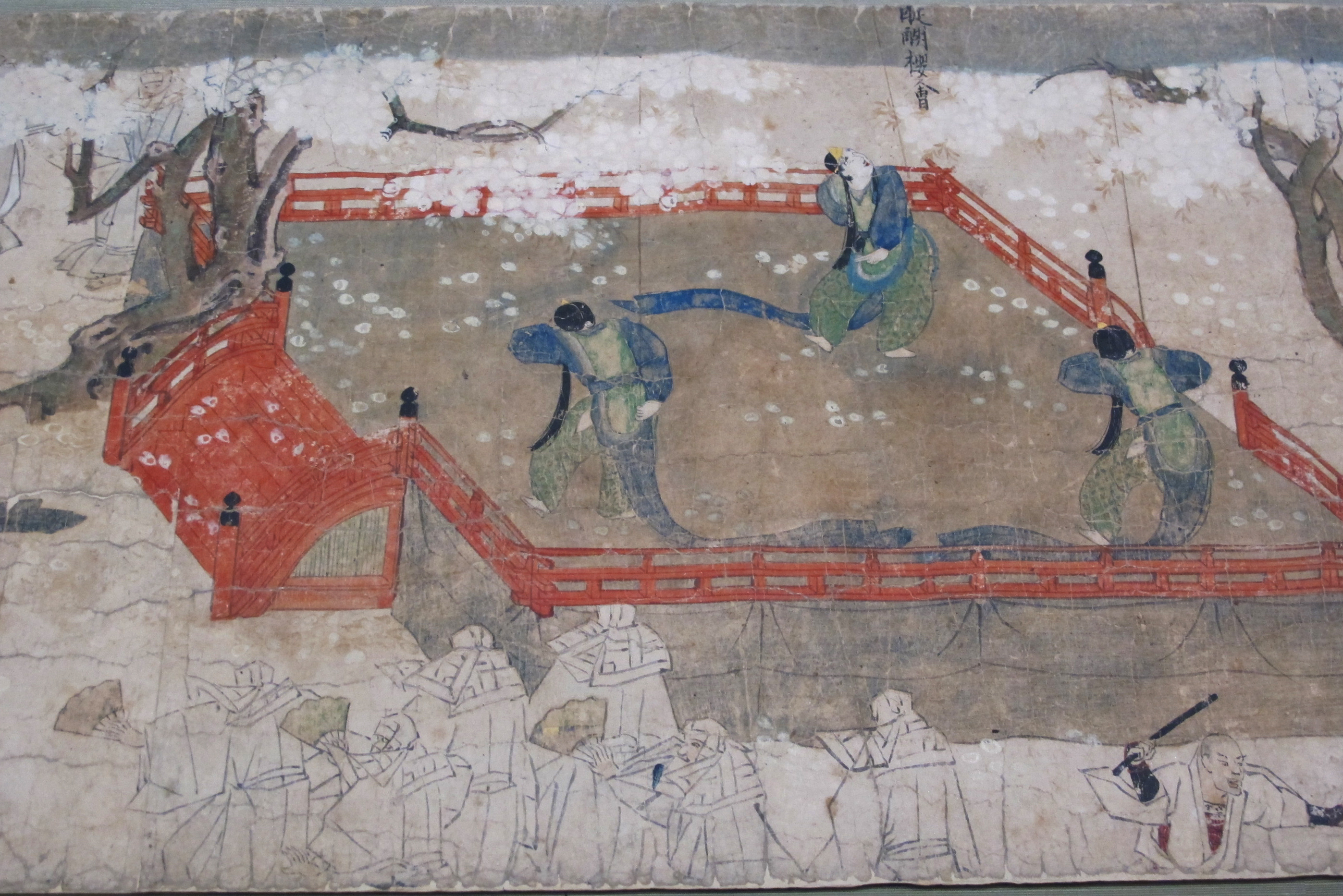 Periodo kamakura, tungu zoshi emaki, XIII sec.